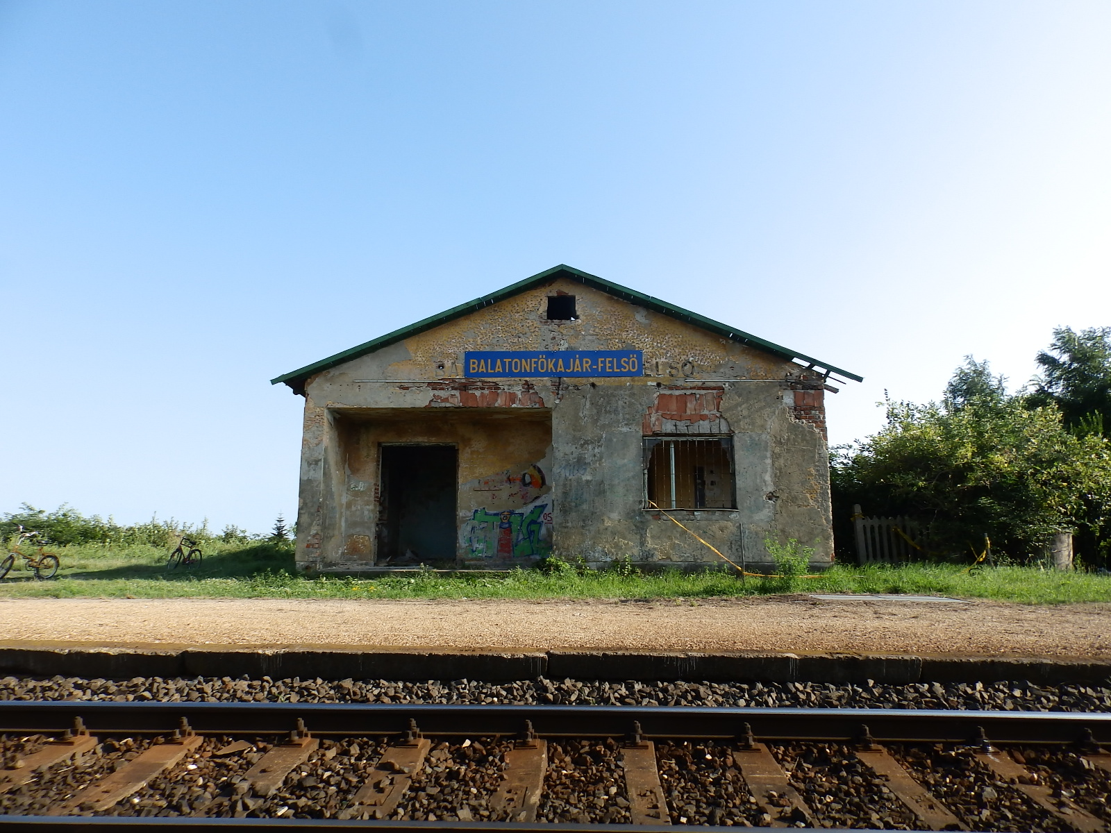 Balatonfőkajár-felső vasútállomás a 2018-as felújítás előtt